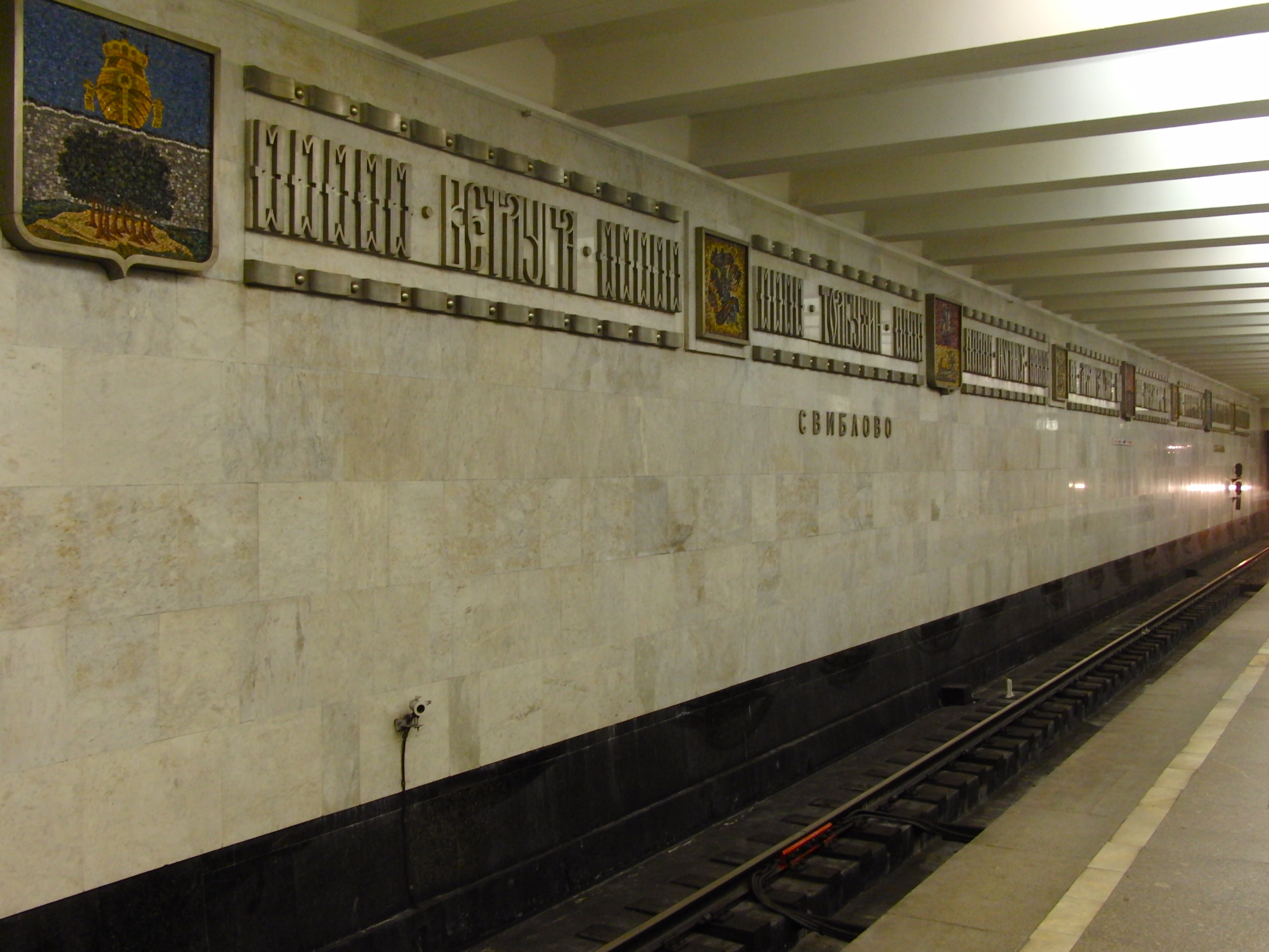 Sviblovo (Свиблово)